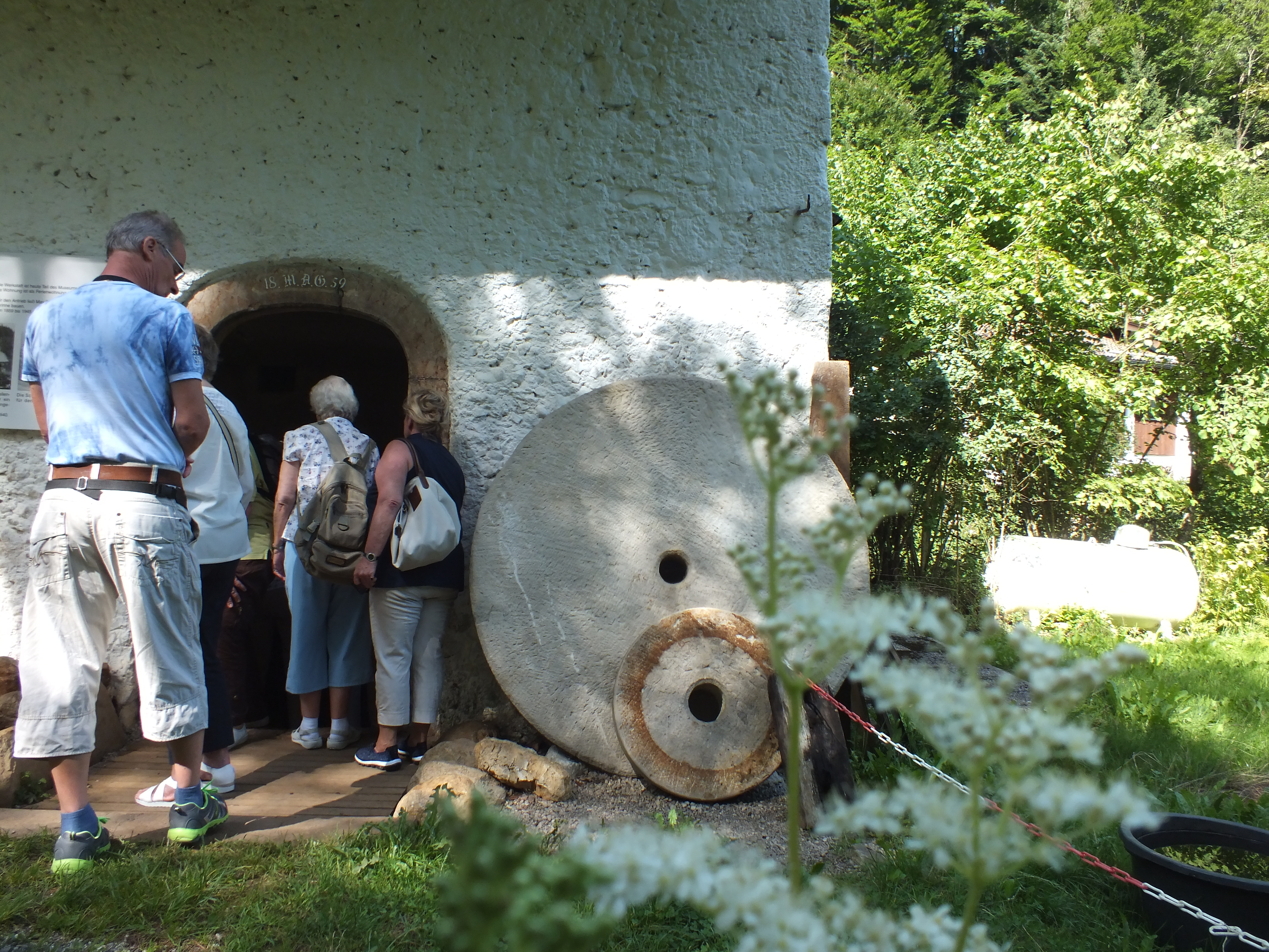 Glockenschmiede und Museum Ruhpolding